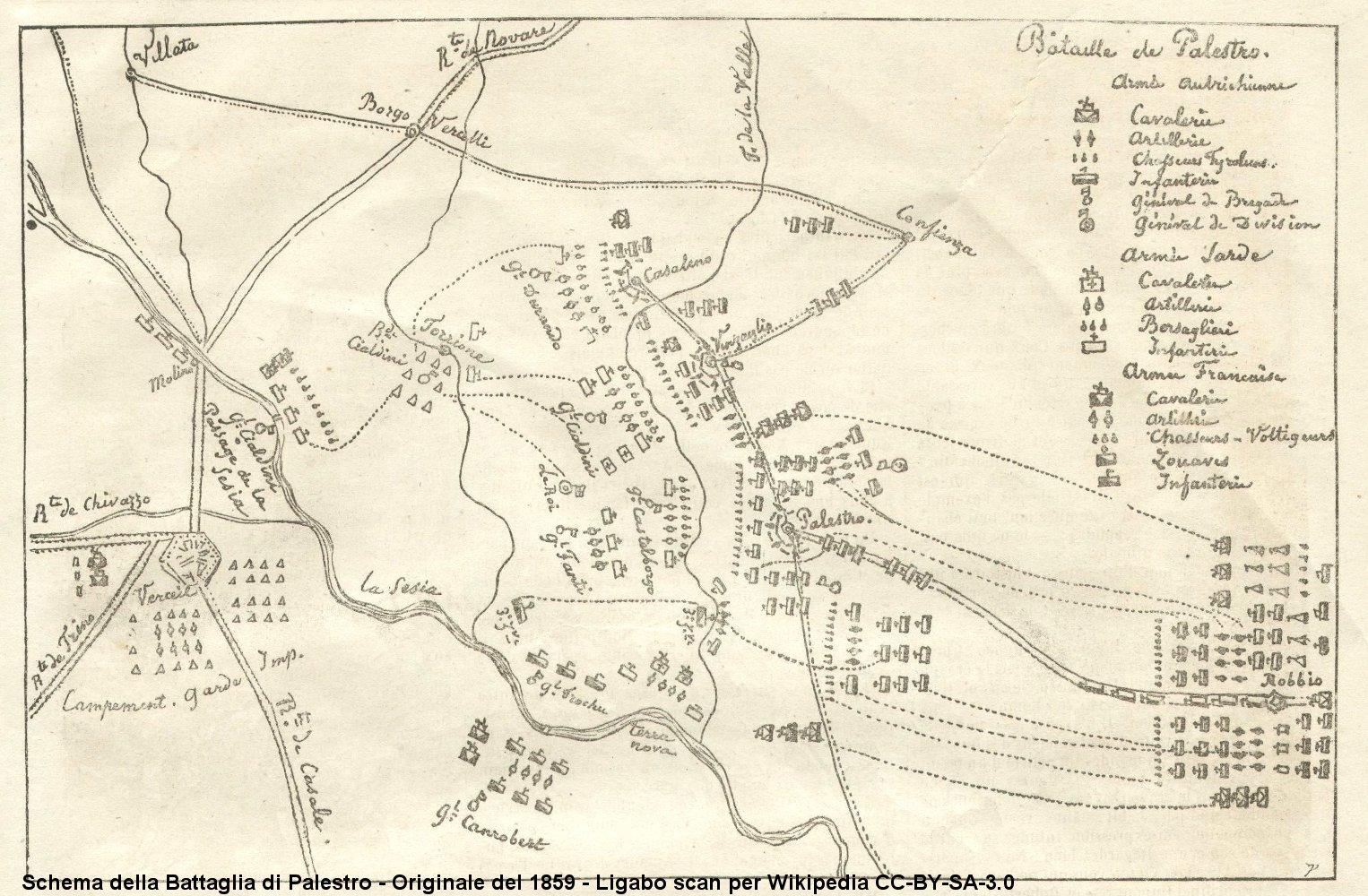 Schema della battaglia di Palestro - 1º movimento